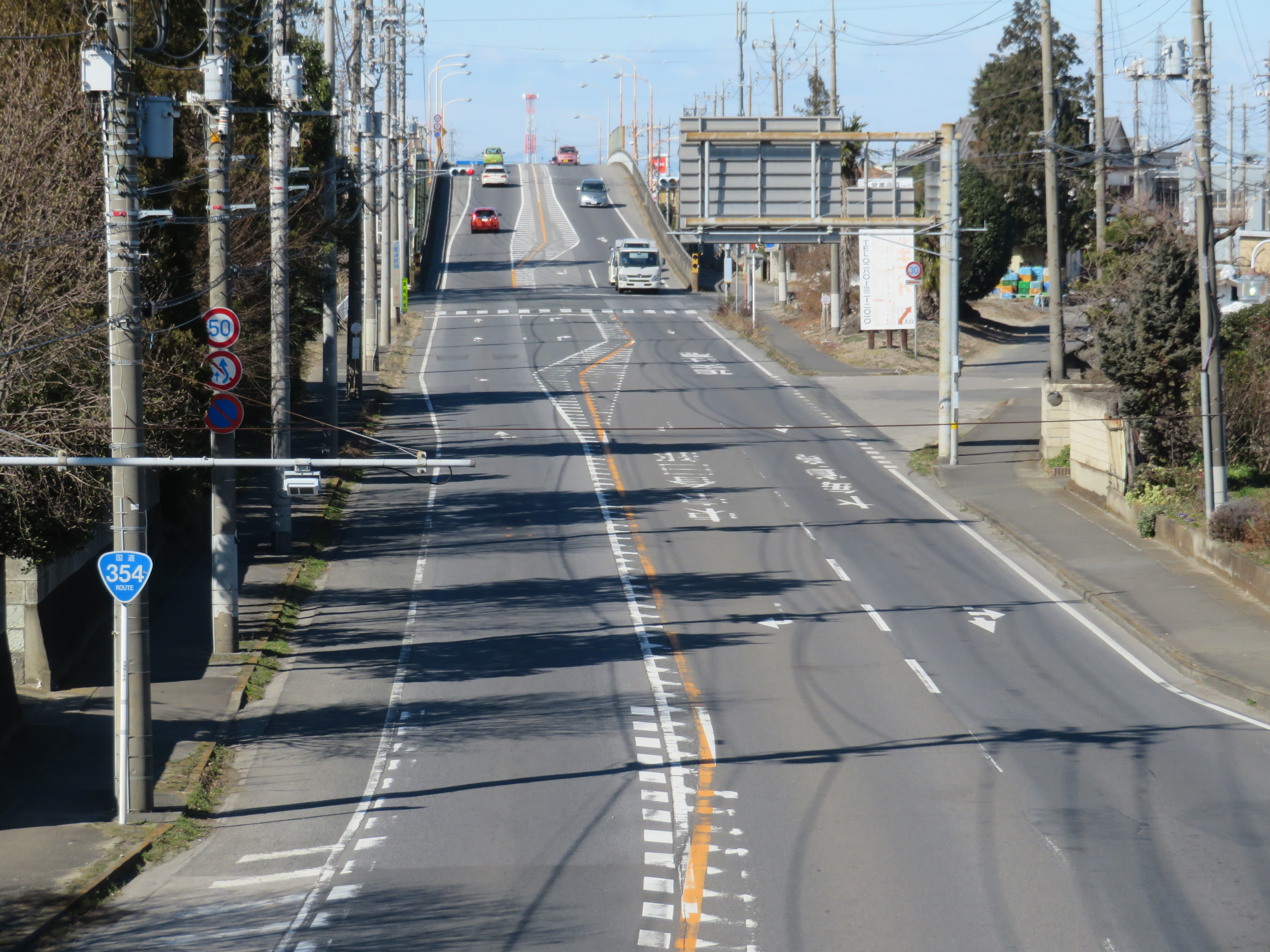 国道354号線茨城県古河市大堤付近（大堤第二歩道橋から舘林方面を撮影） Canon PowerShot SX720 HS